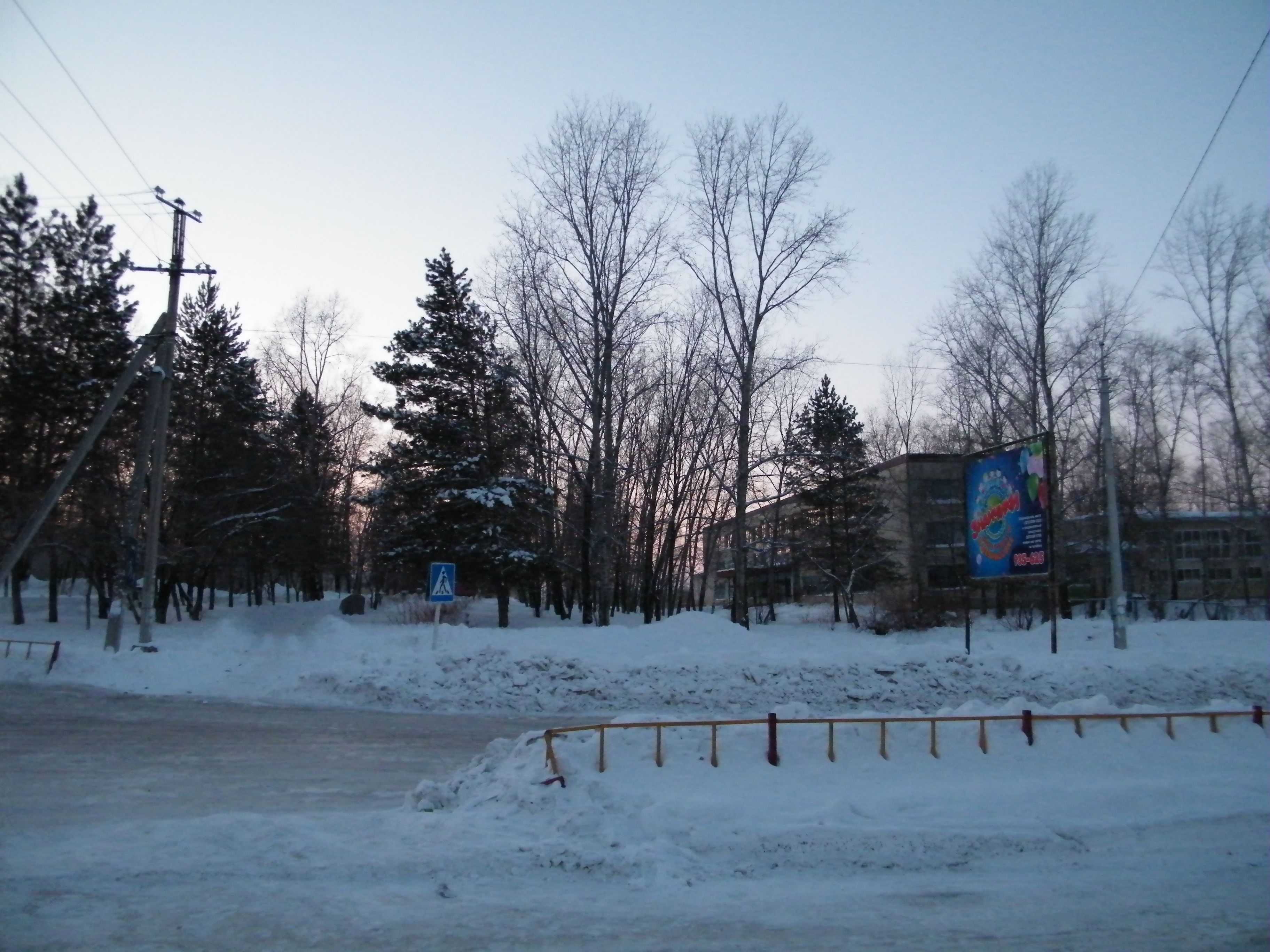 Село Некрасовка Хабаровский край